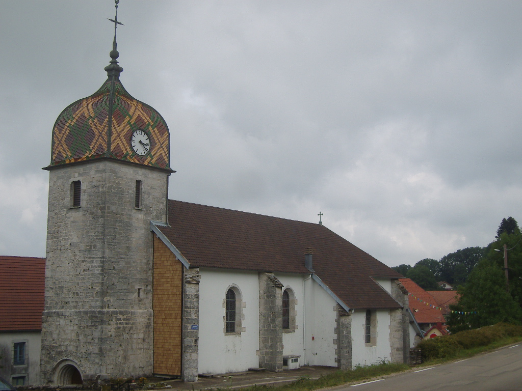 église de Déservillers (Doubs - France)